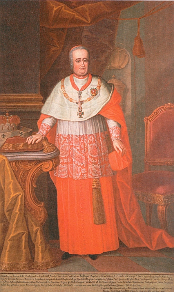 Batthyány József magyar érsek, bíboros, hercegprímás.